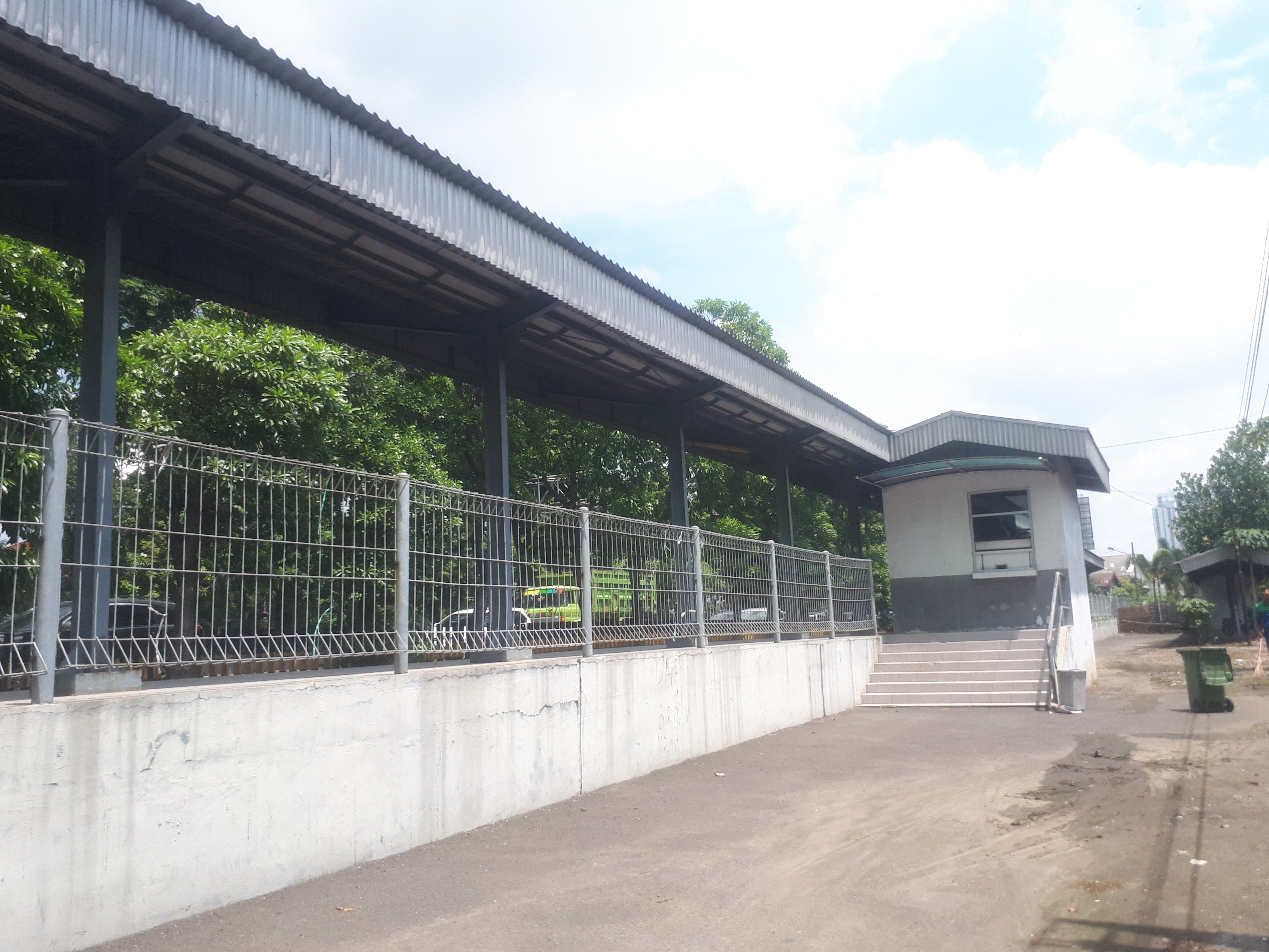 Tampak luar Halte Kertomenanggal tahun 2020